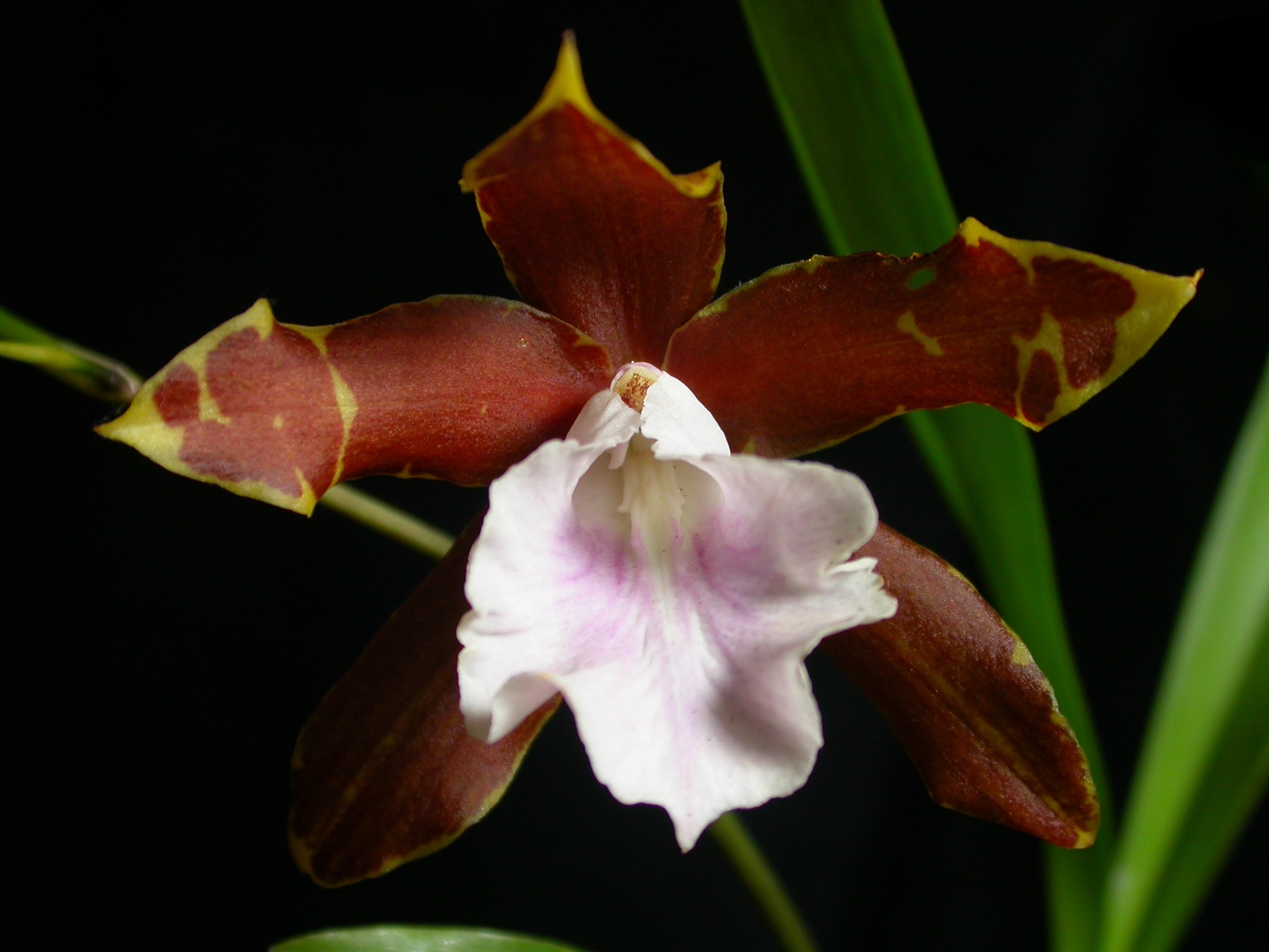 Miltonia candida